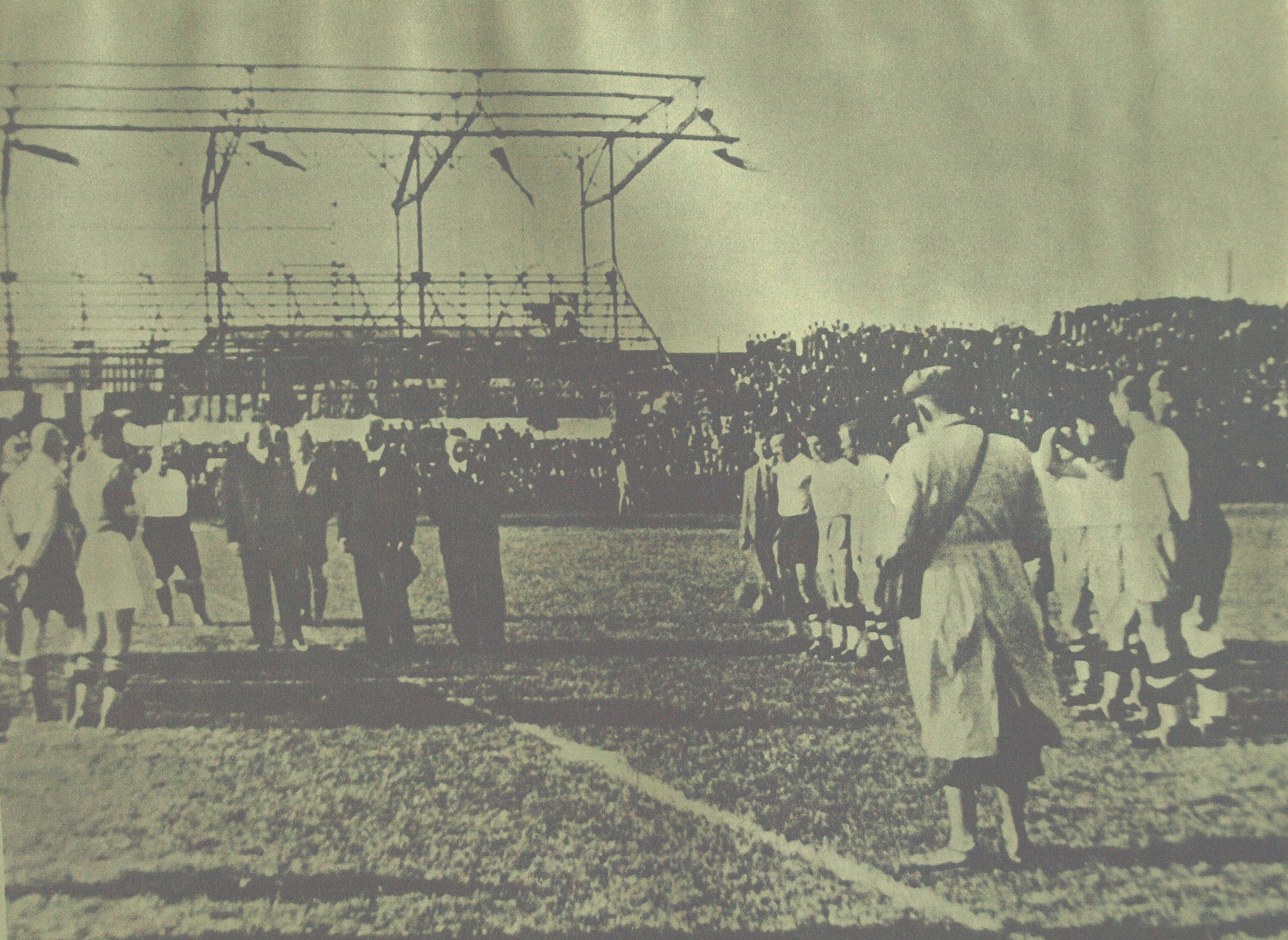 Stadion Ruchu - budowa trybuny krytej, 1936